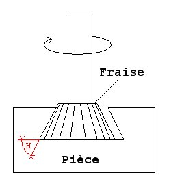 Shéma d'une fraise d'angle